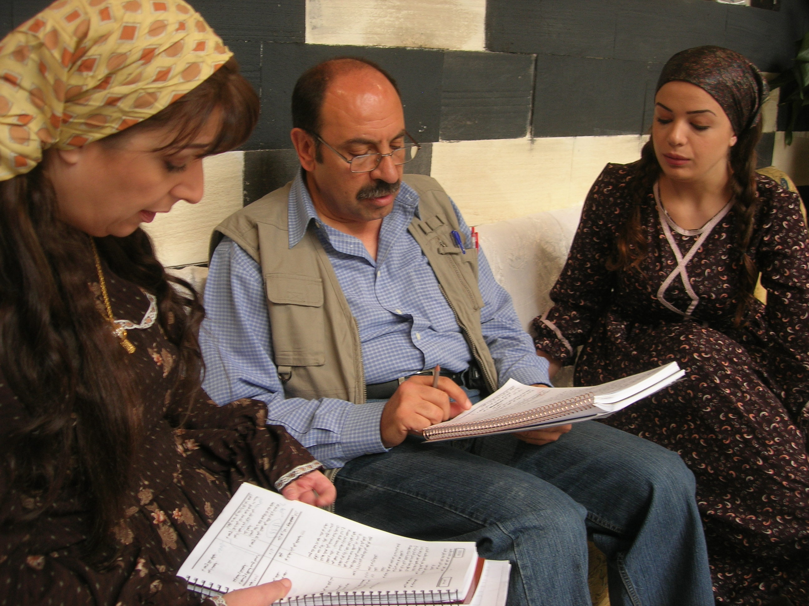 اخراج تلفزيوني